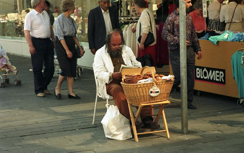 29.7.1991 Szenen in der Bonner Innenstadt (Fußgängerzone) während des Sommer-Schluß-Verkaufs